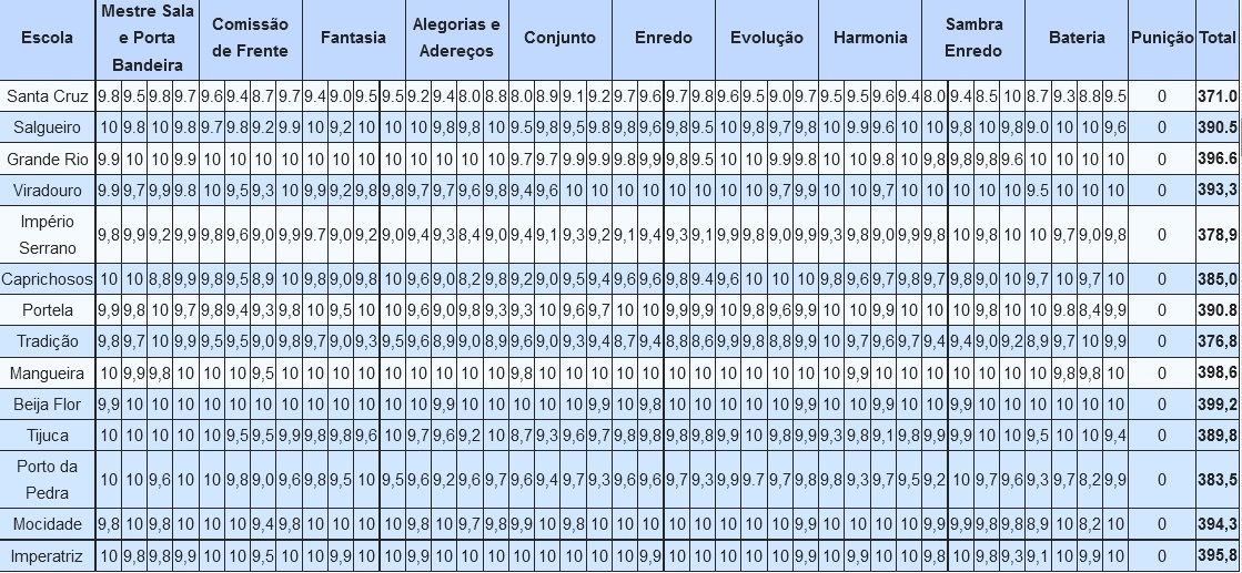 Resultados do Carnaval do Rio - 2003